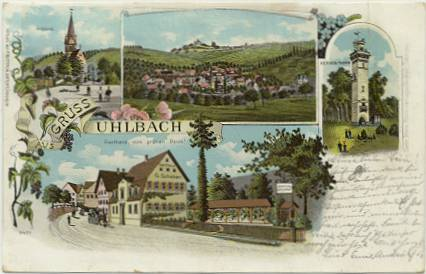 Potkartenwerbung für Stuttgart-Uhlbach, 1902